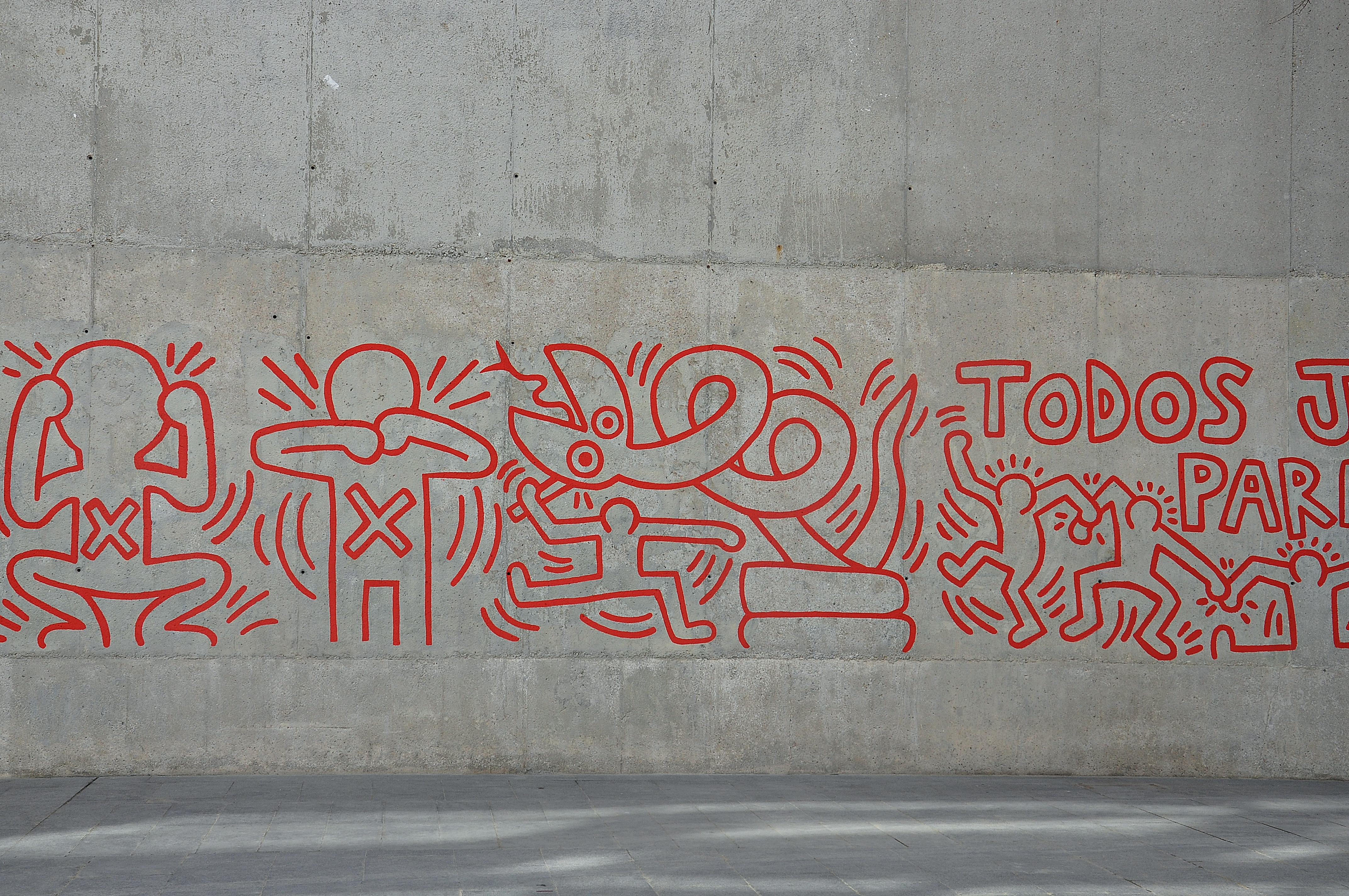 reproduccion del mural en el Macba de Barcelona